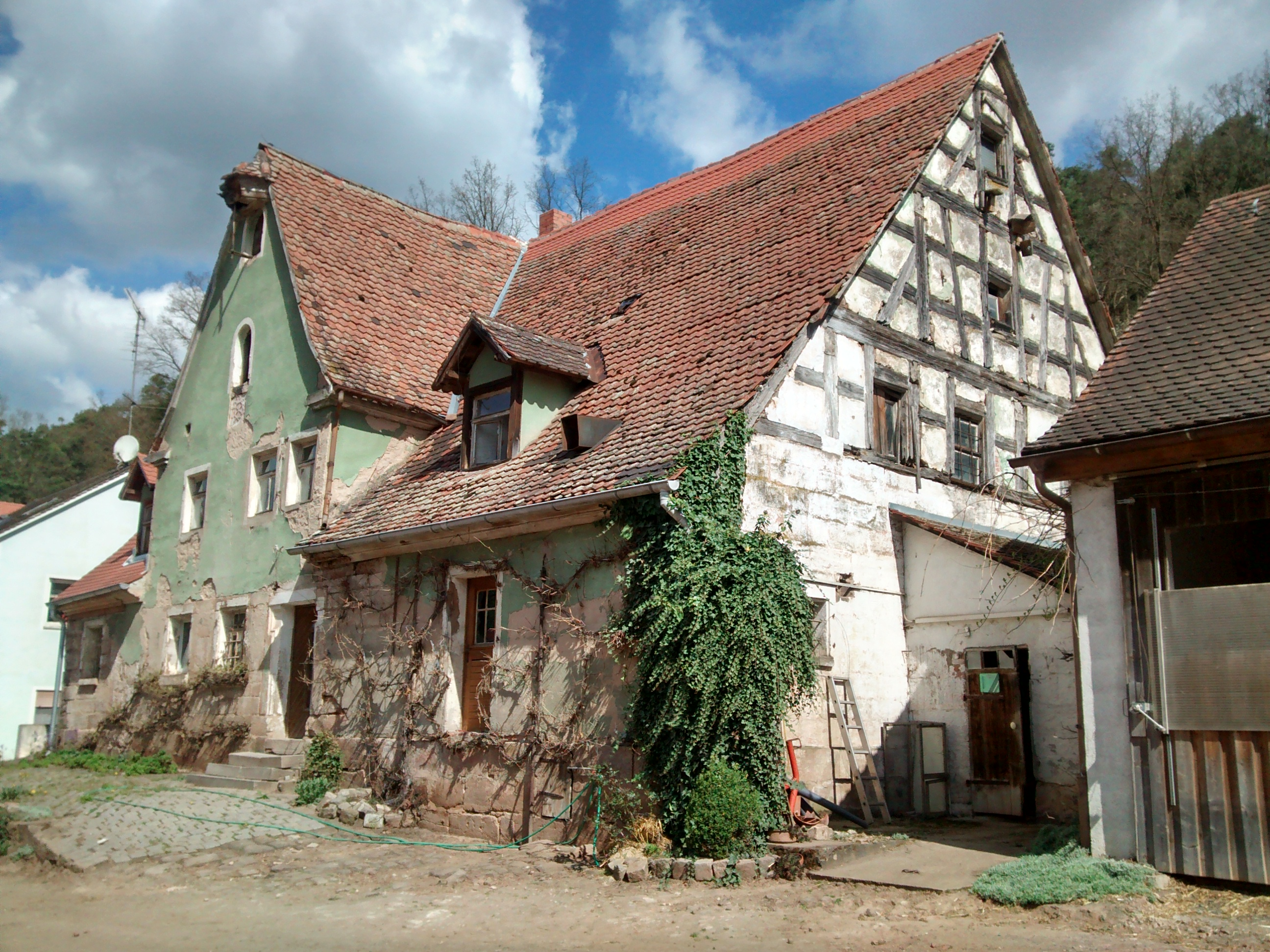 Gebäude der Wendsdorfer Mühle, Wendsdorf 13